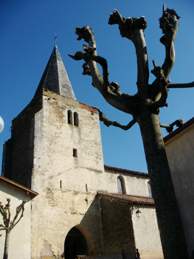 Tour carrée de l'église Saint-Pierre, à Amou (Landes)